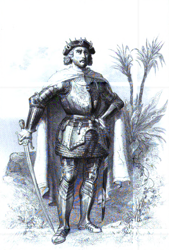 Jehan de Bétancourt